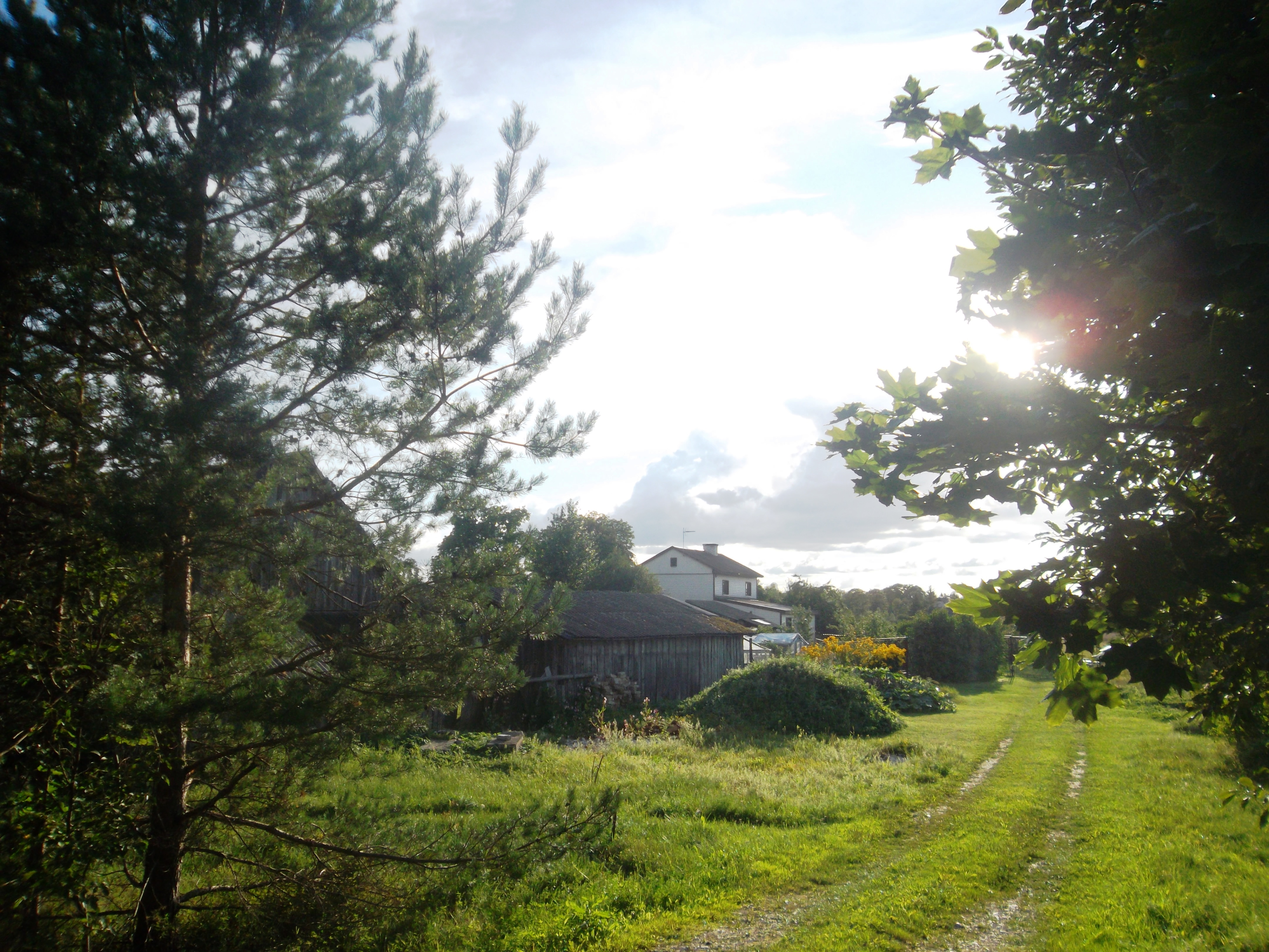 Вана-Аэспа.